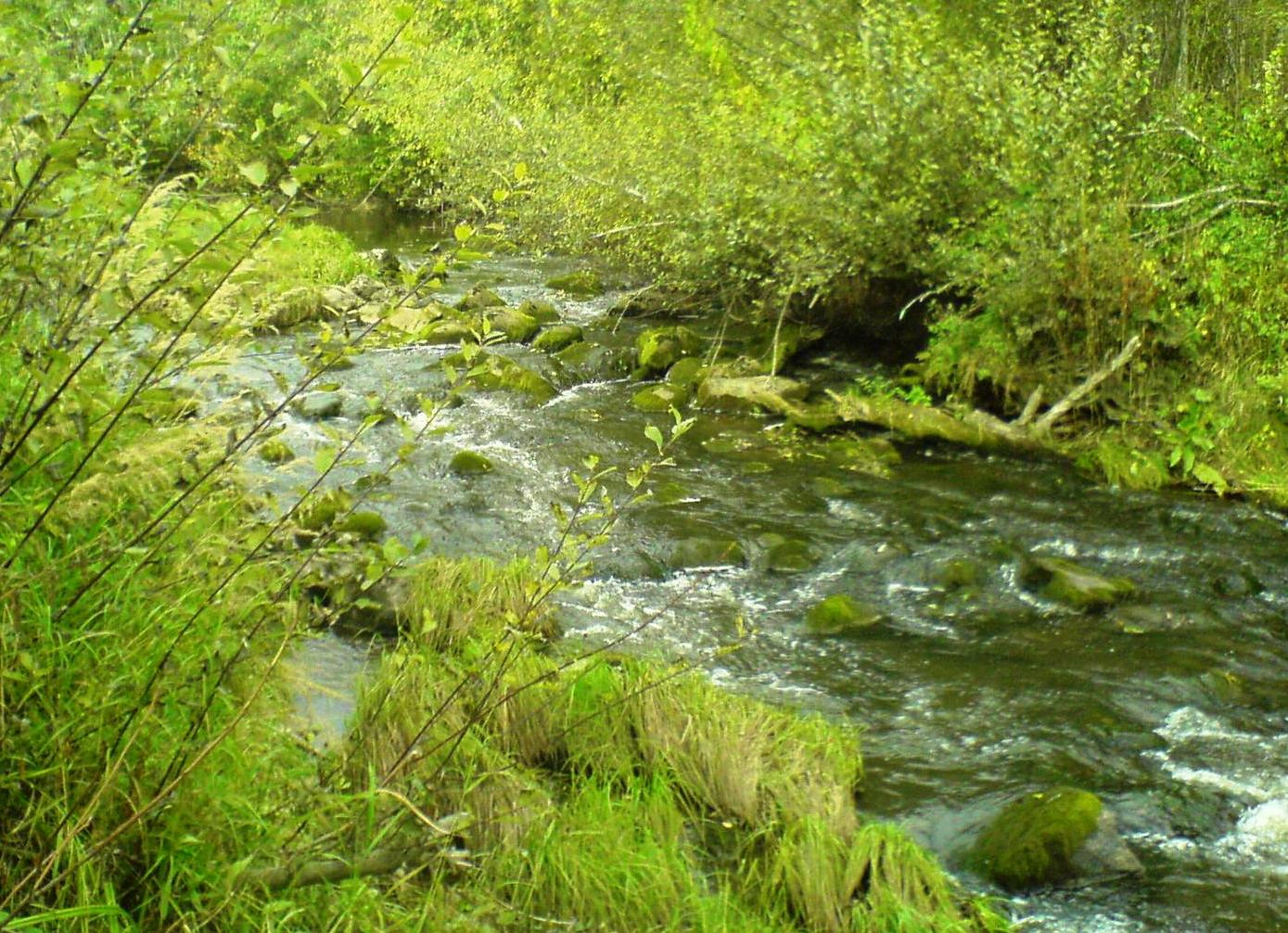 Lierfossen i Lierelva.